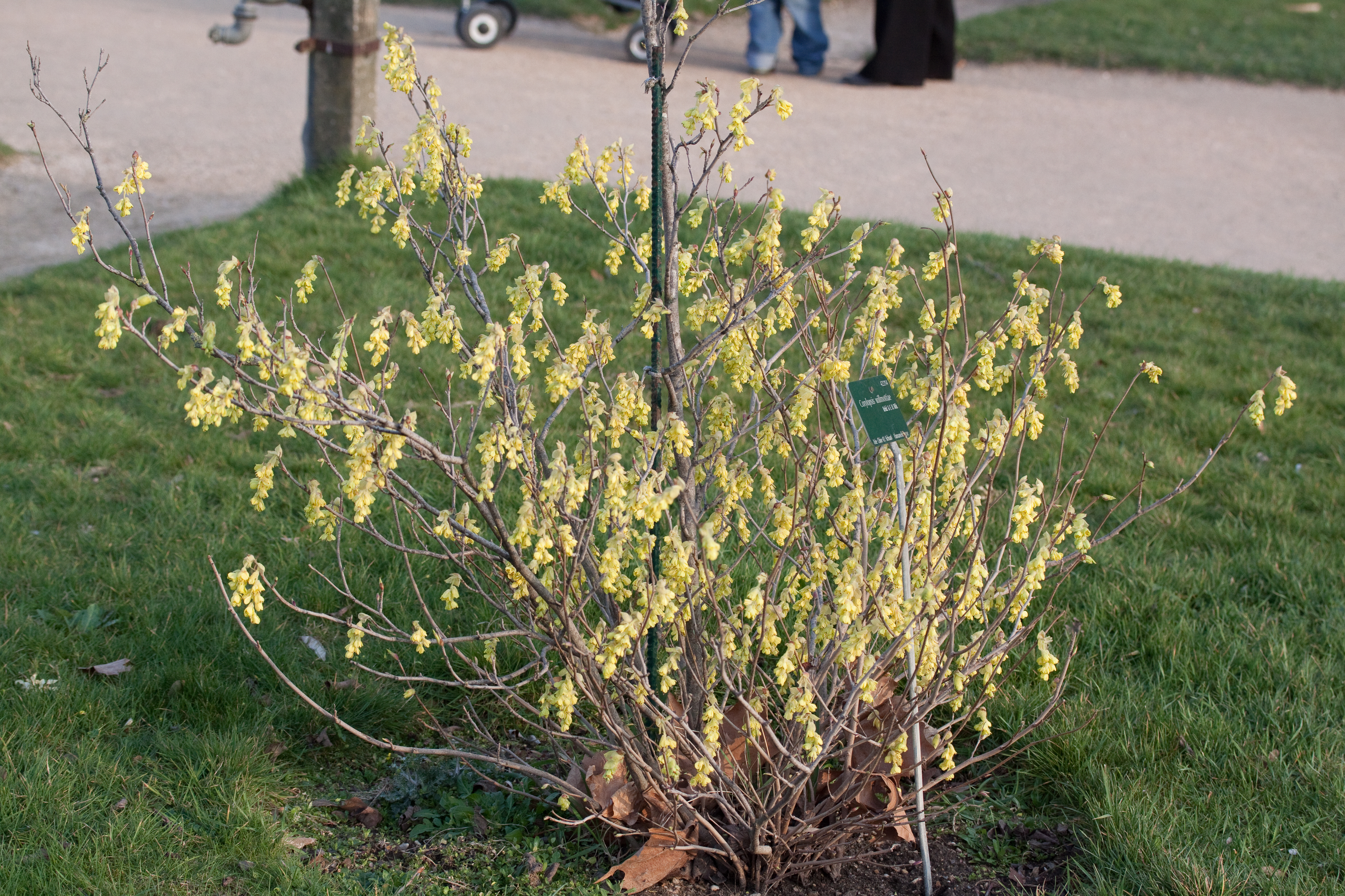 Fleurs de Corylopsis willmottiae - Jardin des Plantes - Paris